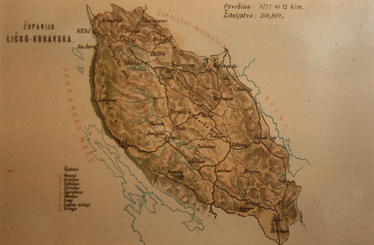 Zemljovidi županija na razglednicama oko 1900. godine, snimljeno tijekom Noći muzeja